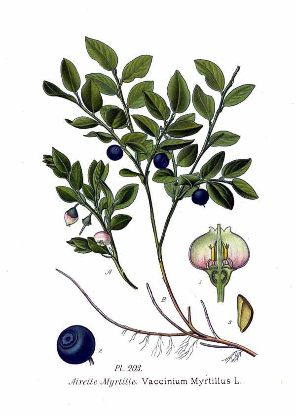 Vaccinum myrtillus L.